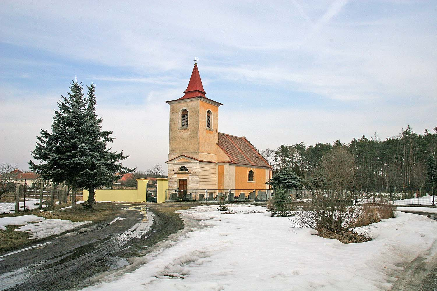 Kostel_Nejsvětější_Trojice_v_obci_Lipec, district Kolín autor: Prazak date: 24. 3. 2006